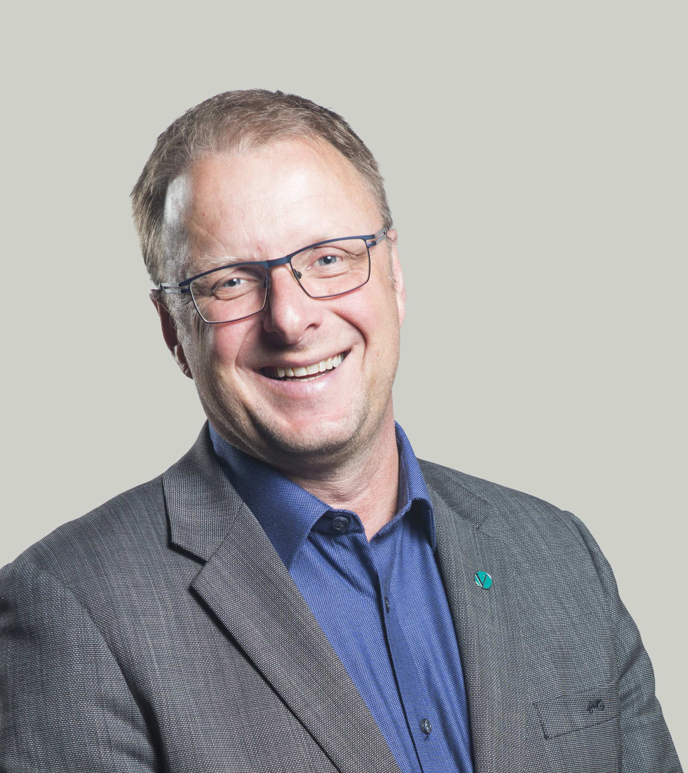 Olav Kasland, lokalpolitiker fra Venstre i Telemark. Ordfører i Bø kommune for perioden 2011-2015. Kandidatbilder fra LM2015. Foto: Jo Straube.